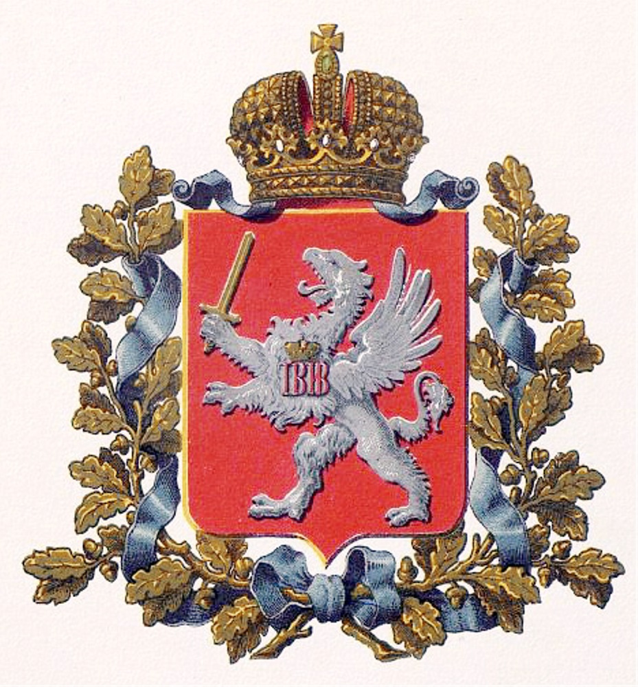 Official Russian Empire coat of arms Liflandia Governorate. Герб Российской Империи Лифляндской губернии в Гербовнике Бенке. Утверждён Императором Всероссийским Александром Вторым.